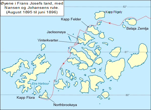 Kart som viser øyene i Franz Josefs land i Nordishavet nord for Russland. Rød linje viser ruten til Nansen og Johansen i august 1895 til juni 1896